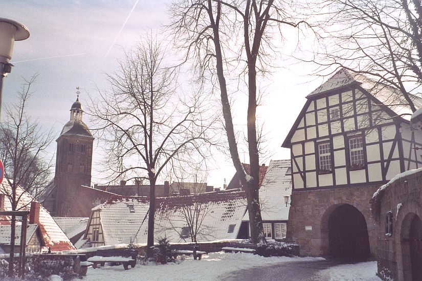 Foto auf die Altstadt von Tecklenburg von der Legge aus, auf der Zufahrt zum Burgtor.